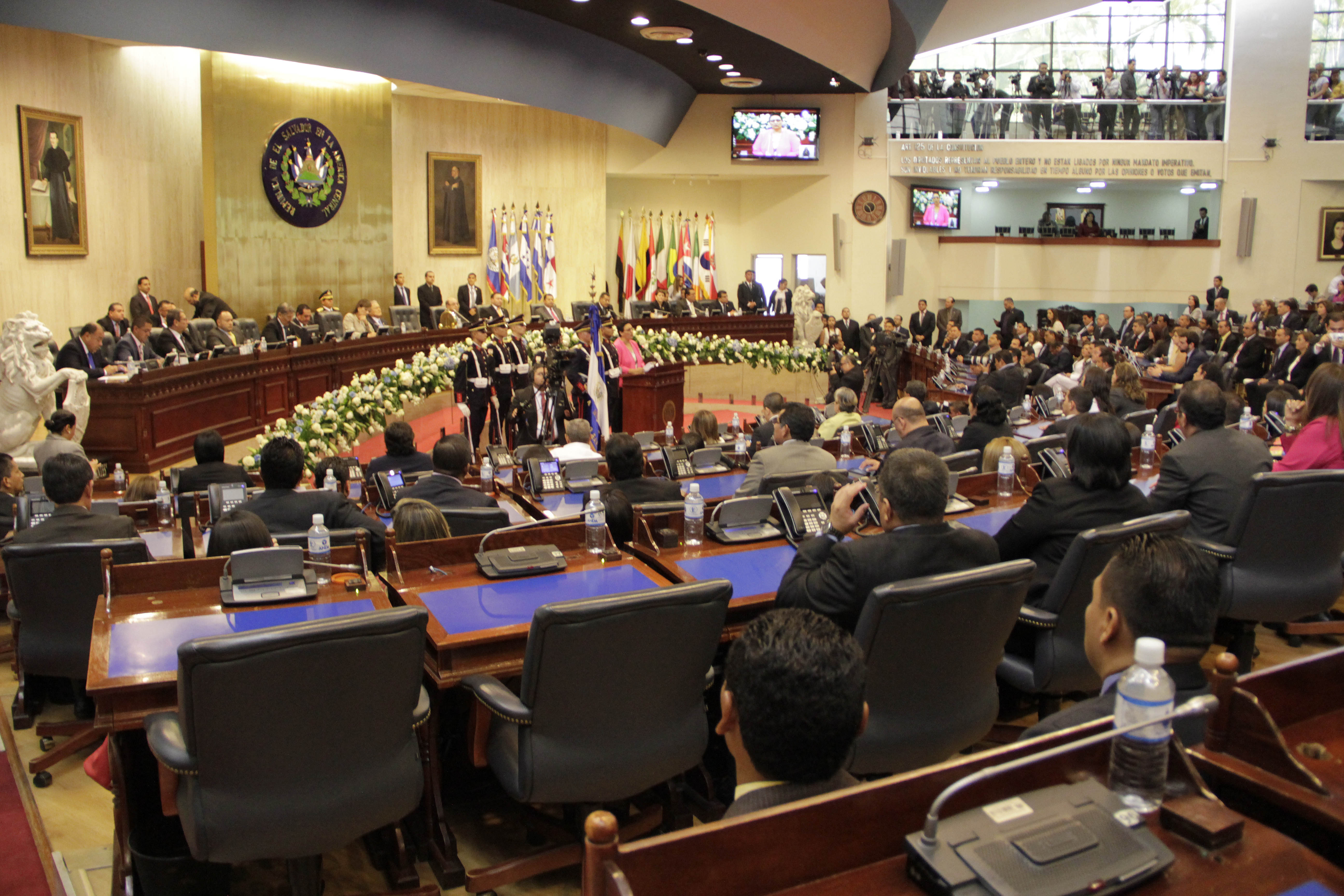 Vista general de la sesion solemne de la Legislatura 2015-2018. Asamblea Legislativa de El Salvador